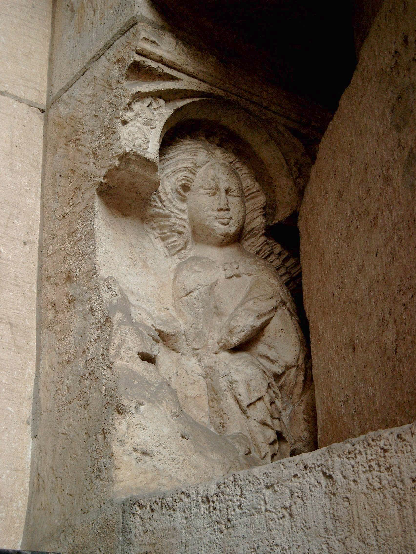 Rzeźba św. Małgorzaty przy wejściu do katedry wawelskiej